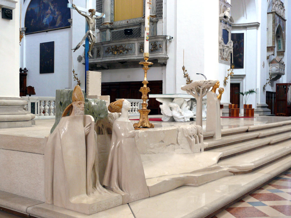 Duomo di Padova - statue di s. Prosdocimo e s. Giustina